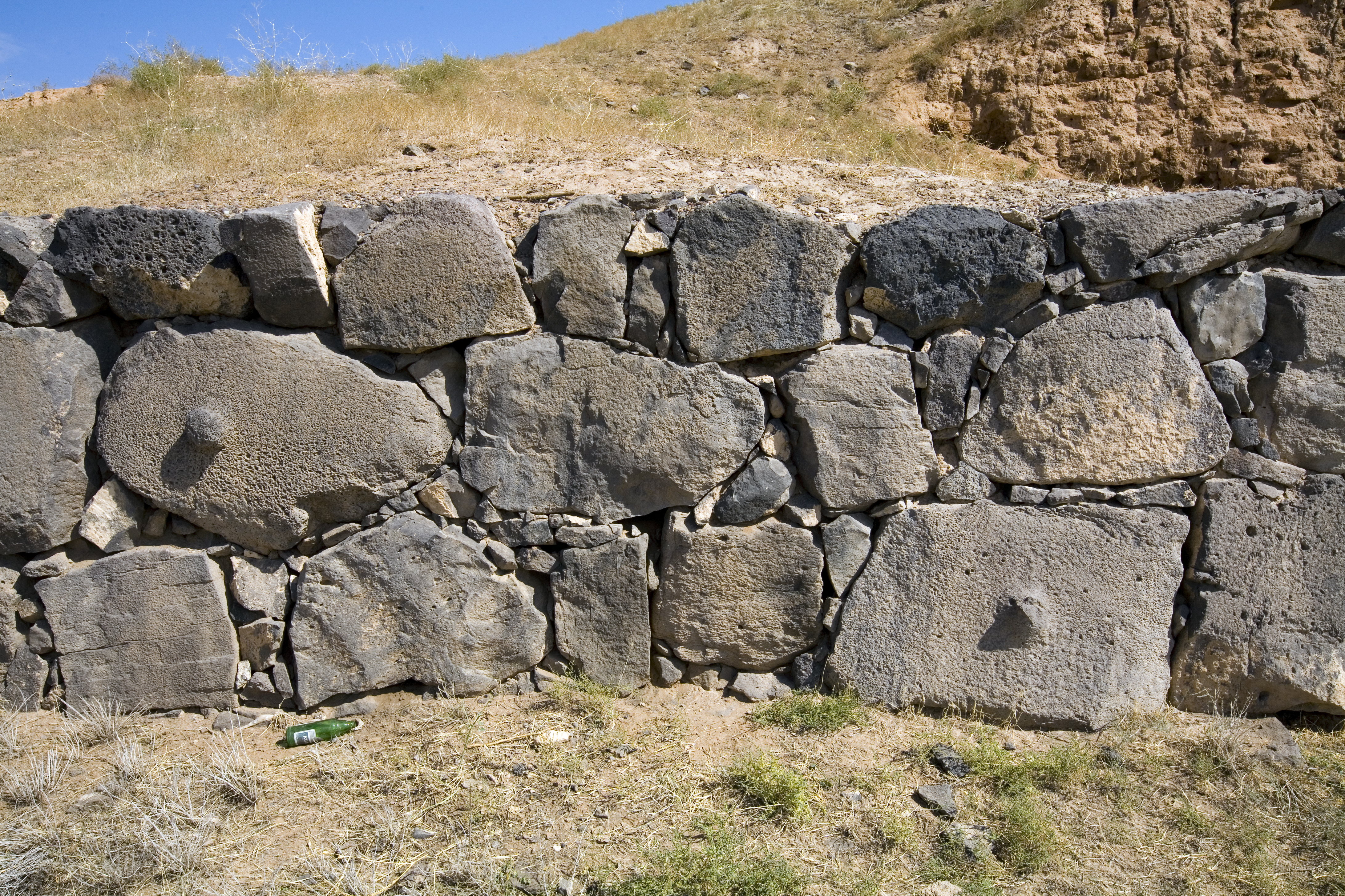 Wall at Karmir Blur, Urartu